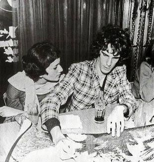 Luis Alberto Spinetta junto a su pareja Cristina Bustamante en Buenos Aires.